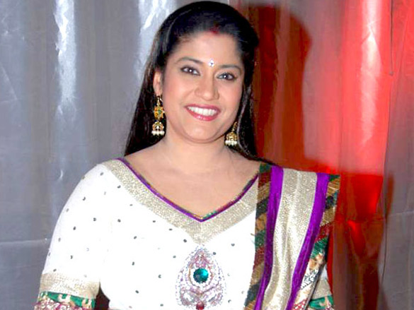 Renuka Shahane at Madhuri, Malaika and Yana Gupta at 'Jhalak Dikhla Ja' press meet